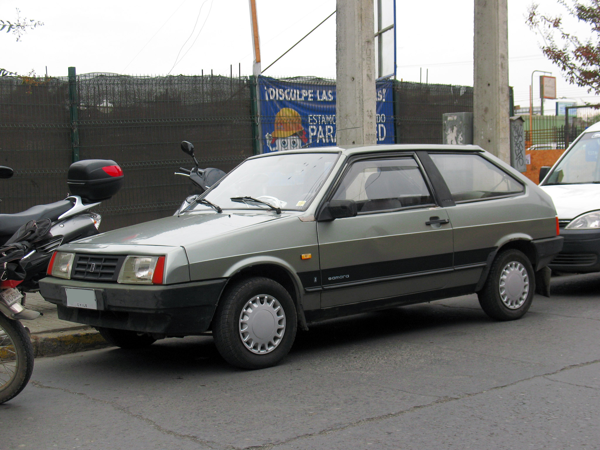 Lada Samara 2108 1100 1991